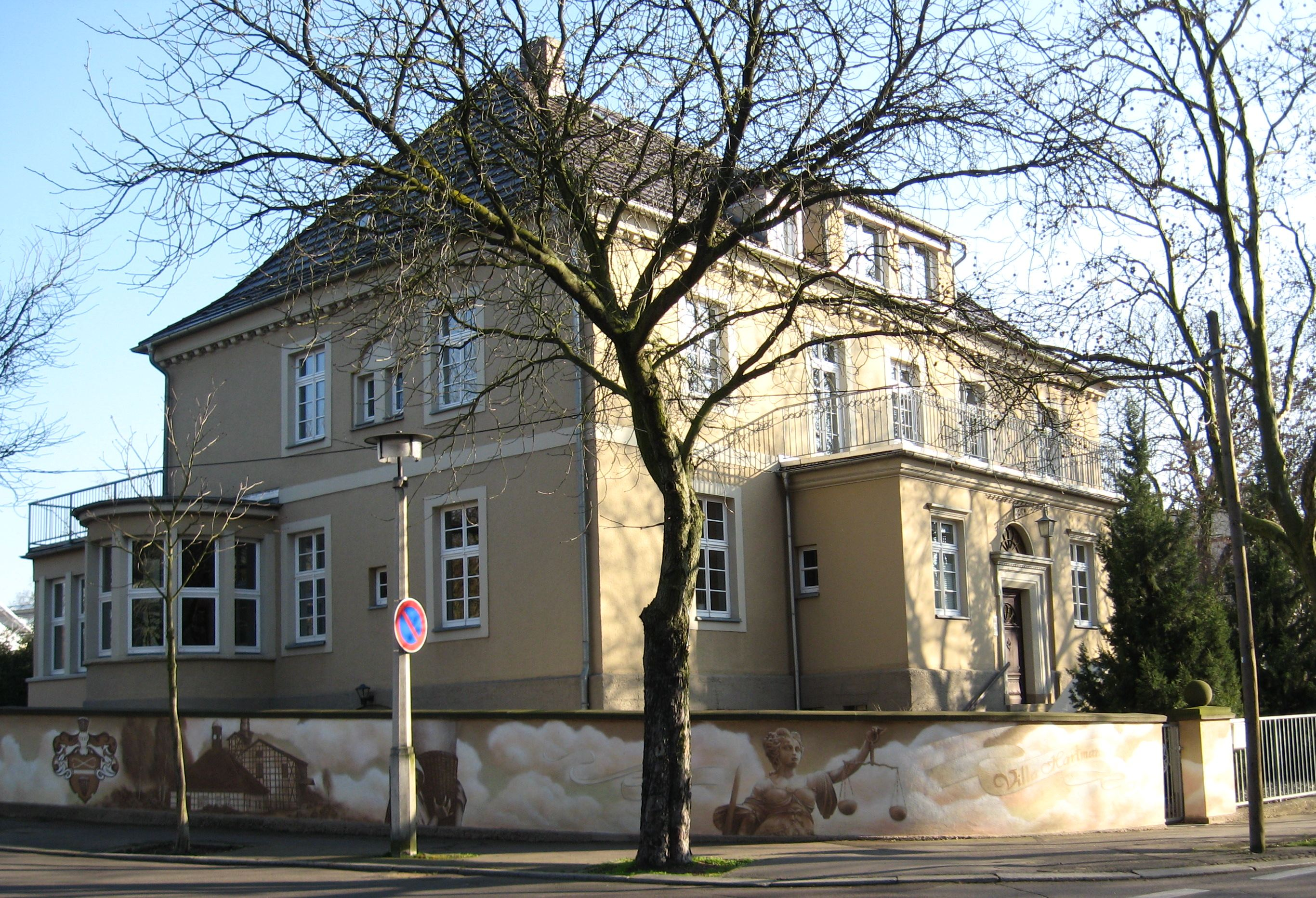 Villa Hartmann (Hermann Frede) Neuwerk 18 in Halle (Saale)